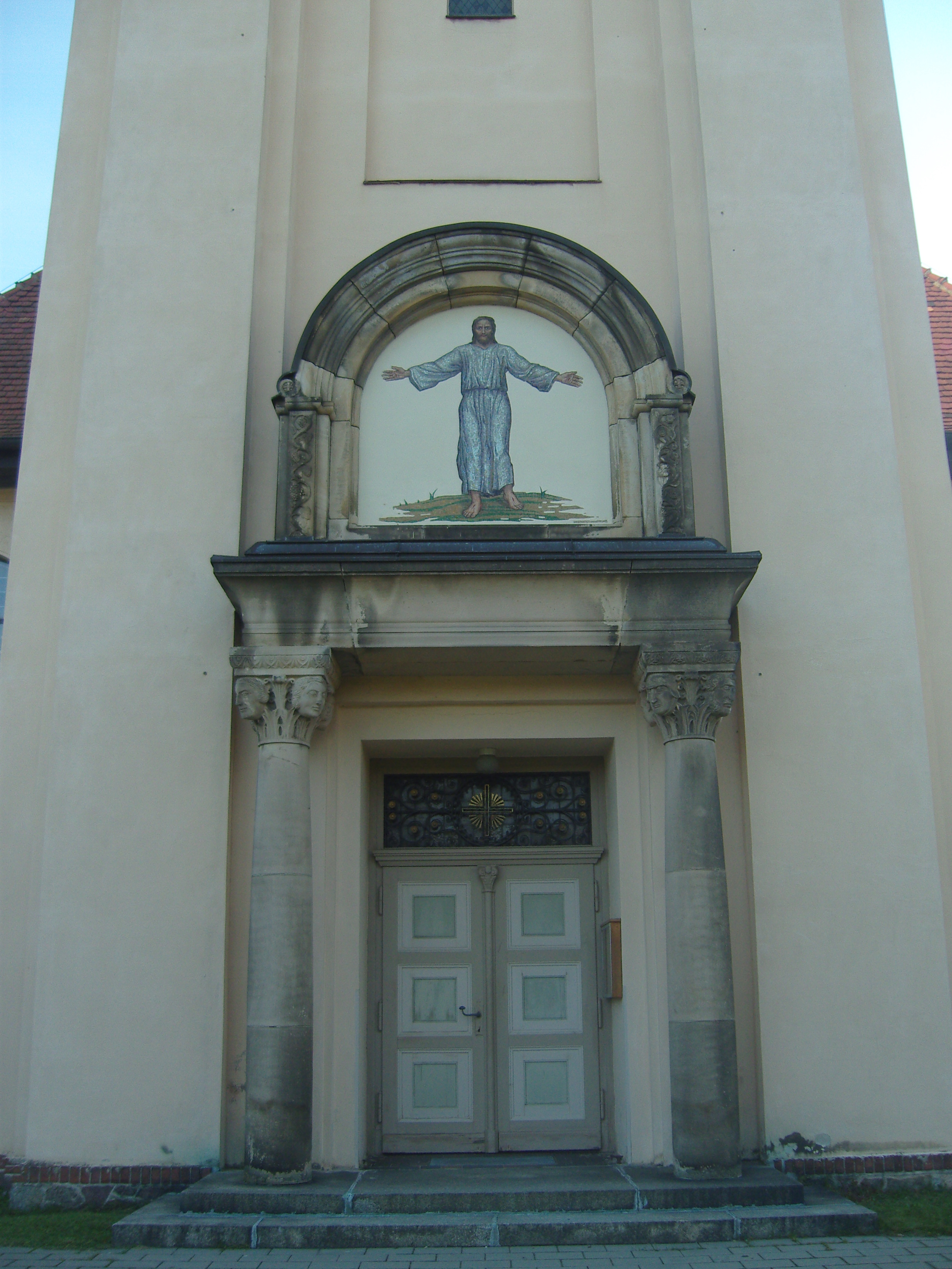 Portal der Kirche in Altdöbern